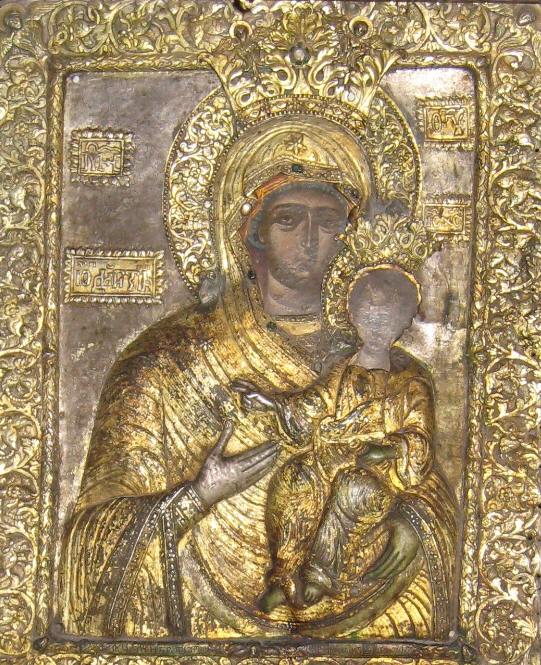 Icoana Maicii Domnului de la mănăstirea Glavacioc - octombrie 2007